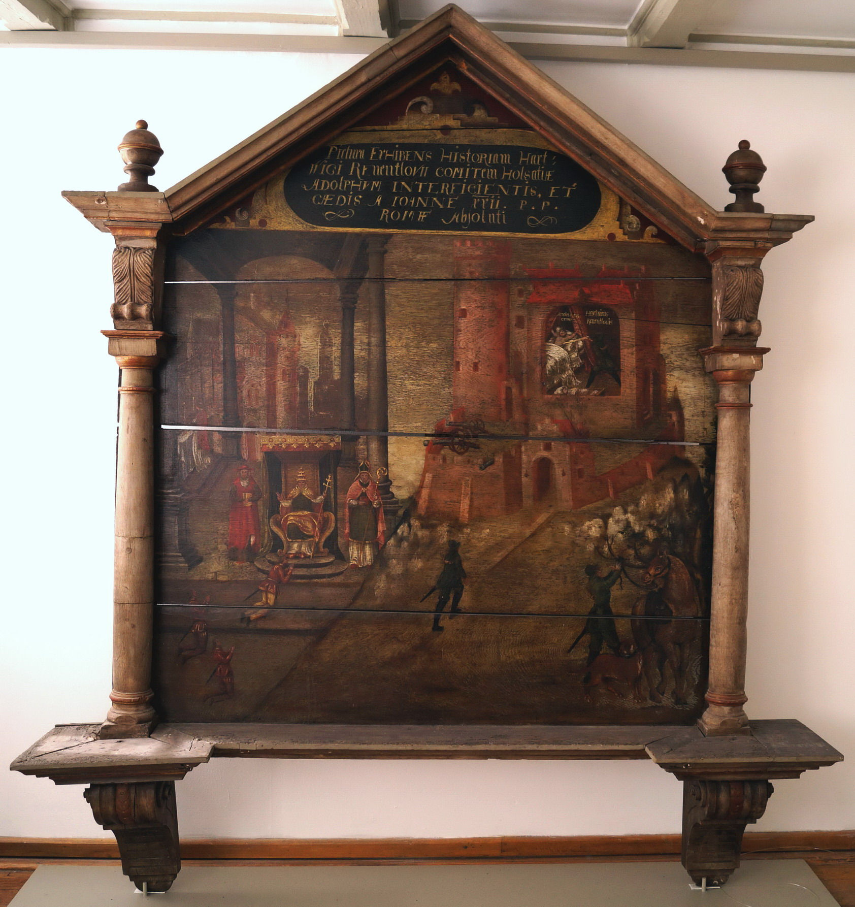 Tafelbild in der Marienkirche in Segeberg mit der Darstellung der Ermordung Adolfs VI. von Schauenburg und Holstein durch Hartwig Reventlow und einer zeitgenössischen Abbildung der Siegesburg auf dem Kalkberg von SO (rechte Bildhälfte), 1595